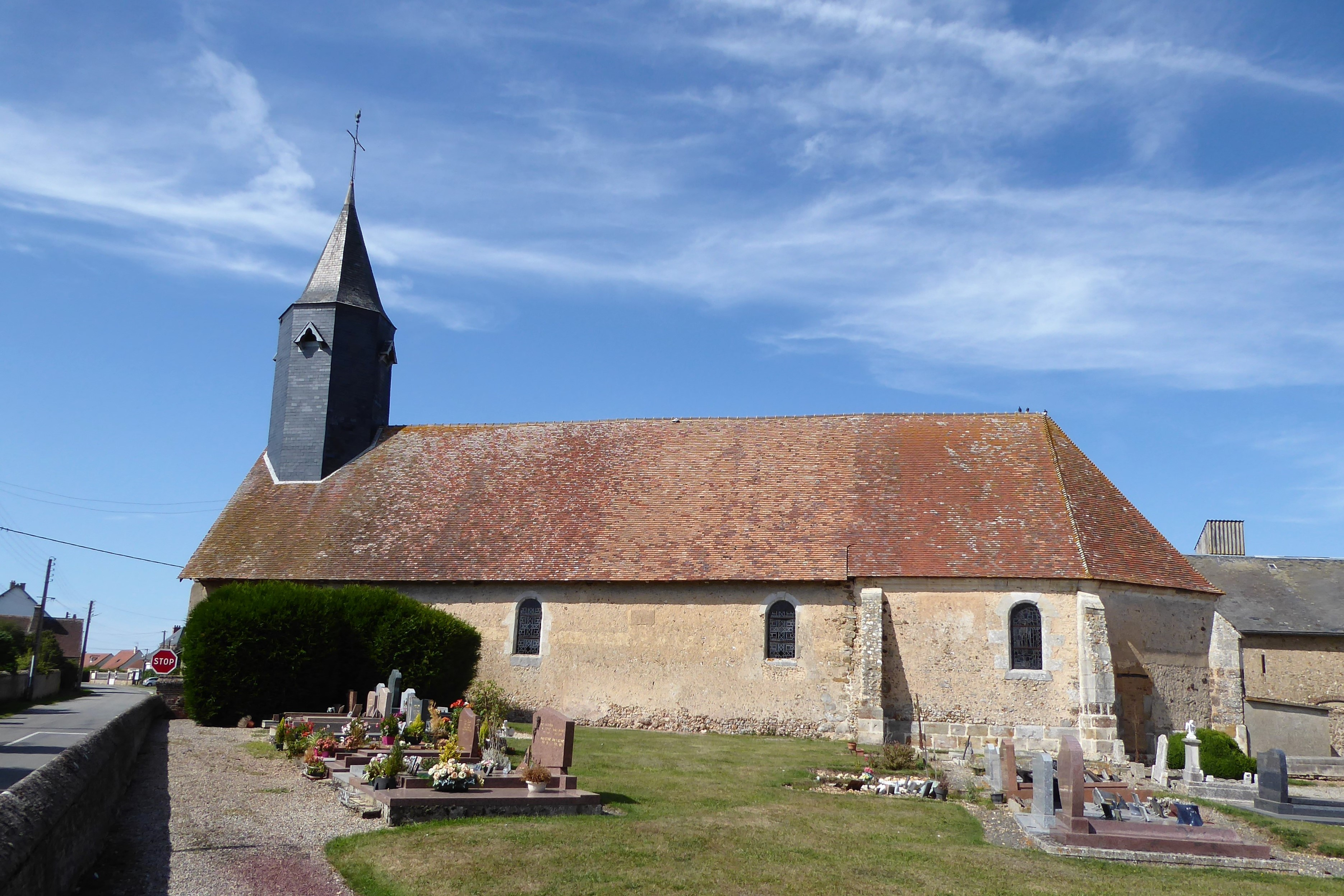 église Saint-Sulpice de Fessanvilliers, Eure-et-Loir, France.